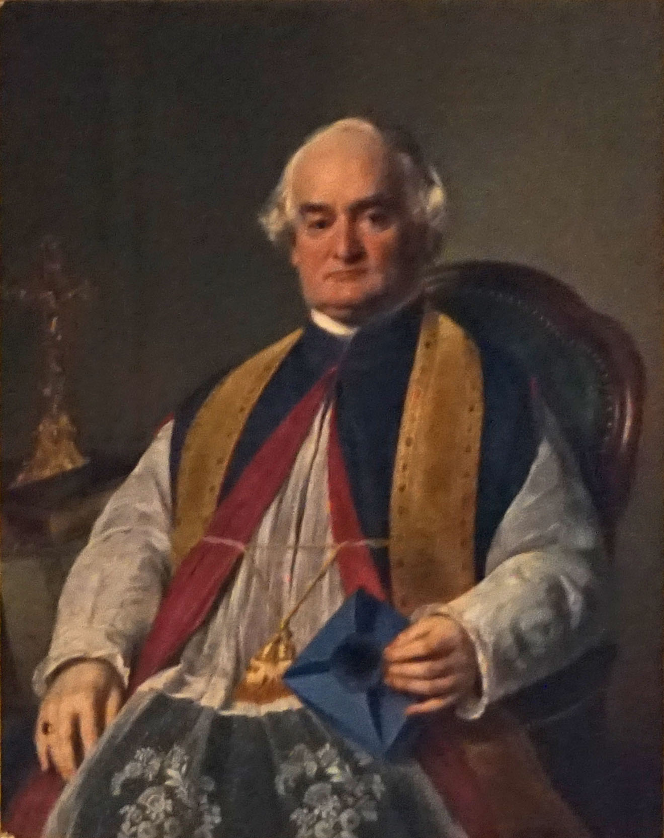 Portrait von Pfarrer Antoine Baud als apostolischer Protonotar (1866)